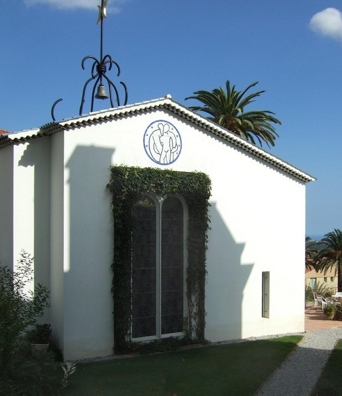 Entrata della cappella decorata da Matisse, a Vence.